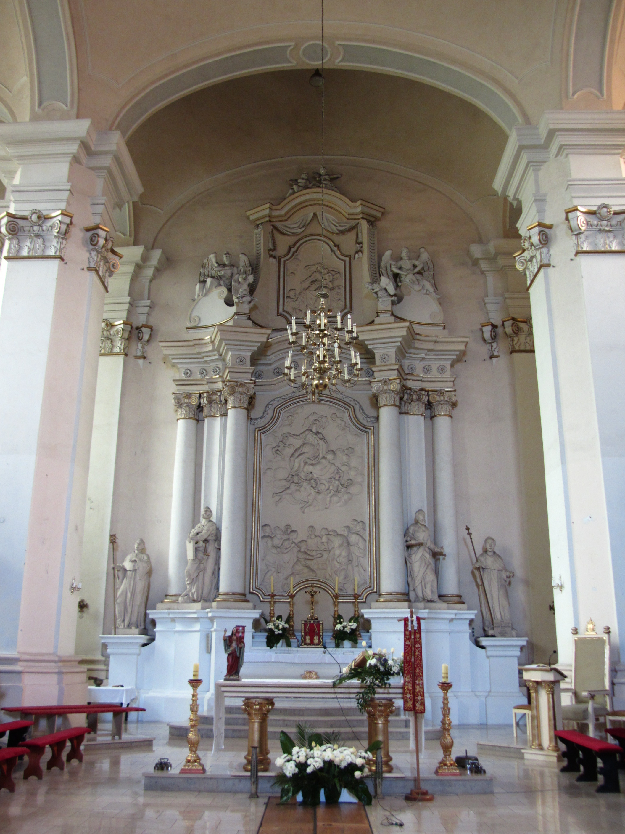 Ołtarz barokowy w kościele cystersów w Wągrowcu. Ołtarz wybudowany w 1799 r., został zniszczony w czasie II wojny światowej i zrekonstruowany w 1960 r. przez Józefa Pade.